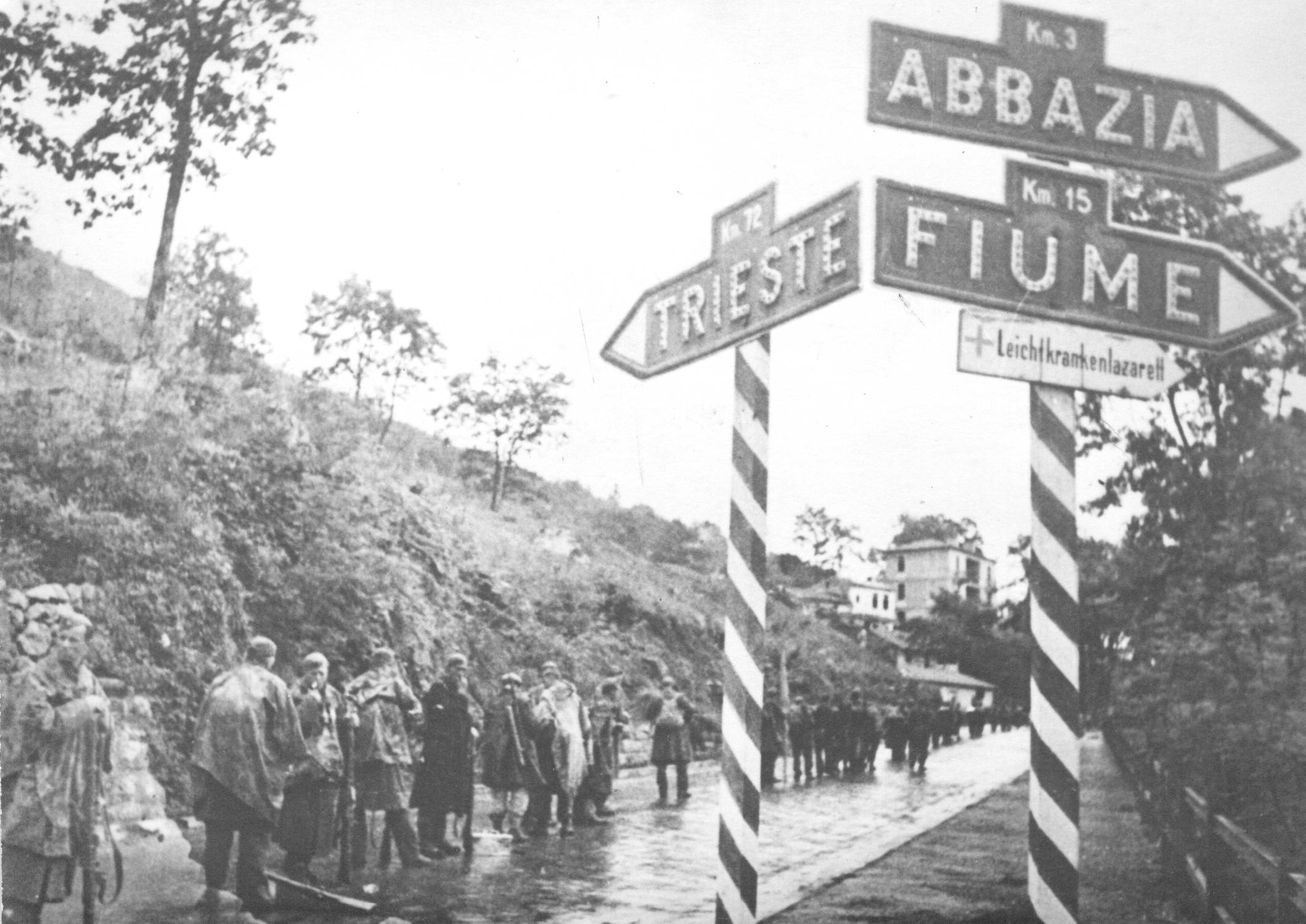 Jedinice 4. armije nastupaju prema Trstu krajem aprila 1945. godine.